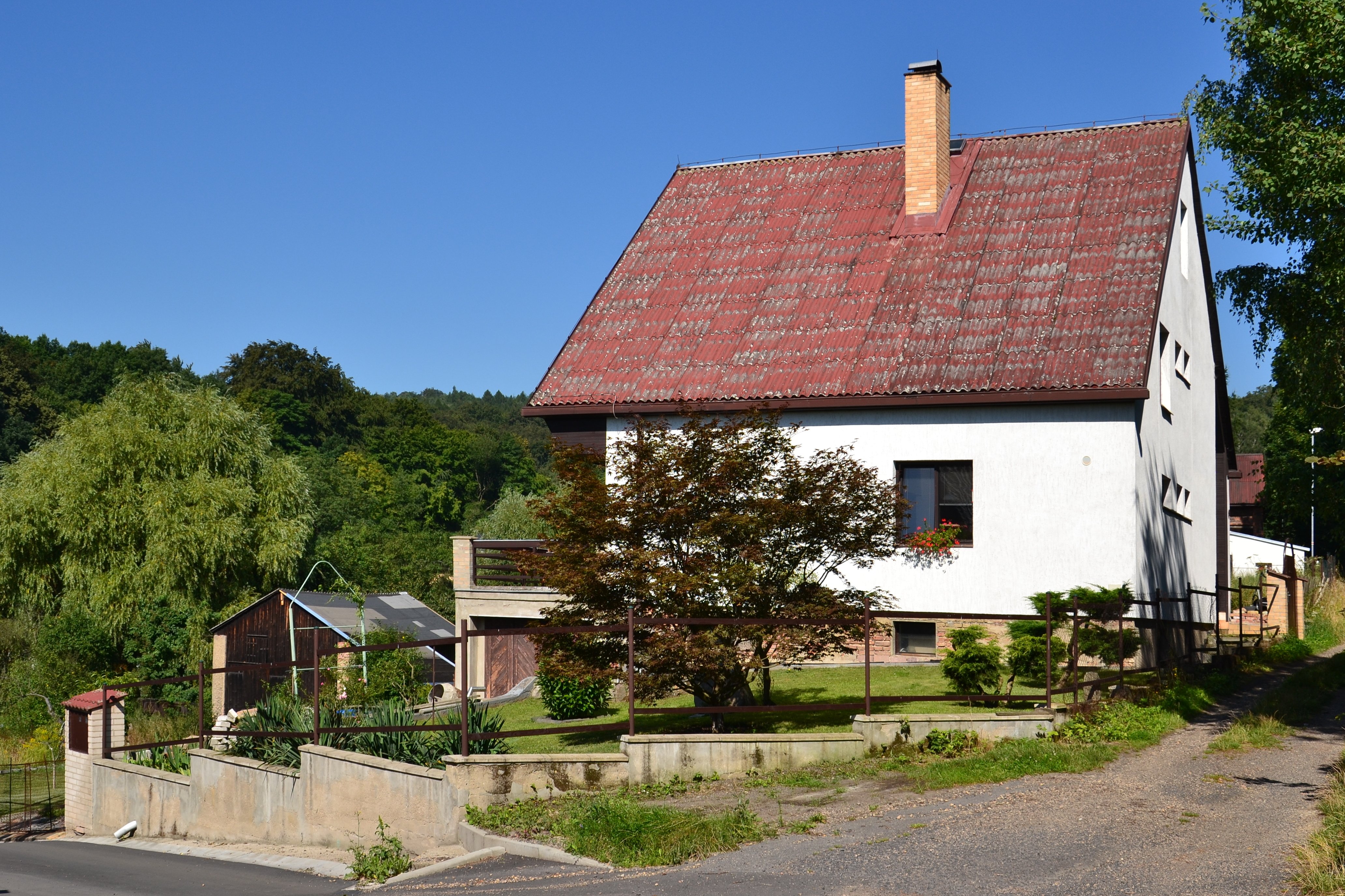 Dům čp. 9